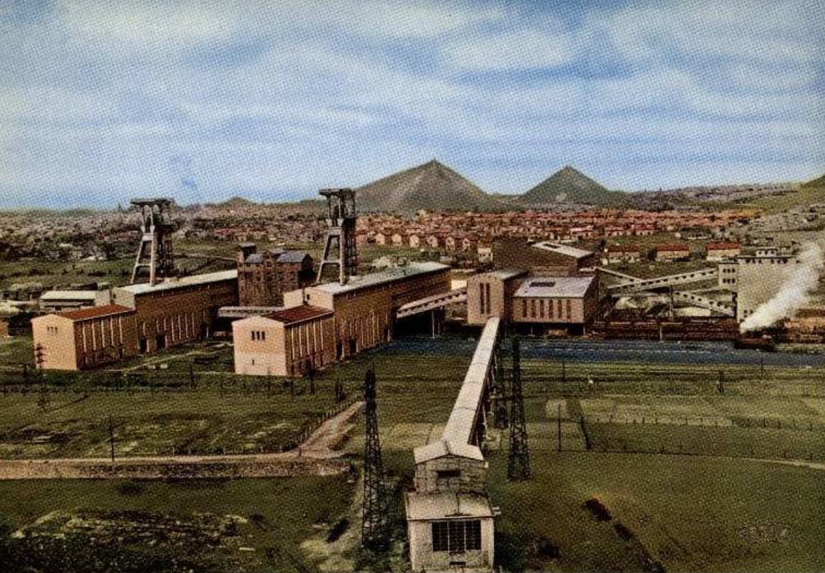 La Fosse n° 2 bis - 2 ter de la Compagnie des mines de Marles était un charbonnage constitué de deux puits situé à Marles-les-Mines, Pas-de-Calais, Nord-Pas-de-Calais, France.